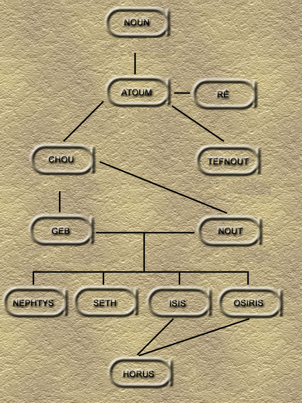 Organigramme de la création du monde selon le mythe héliopolitain (Égypte).